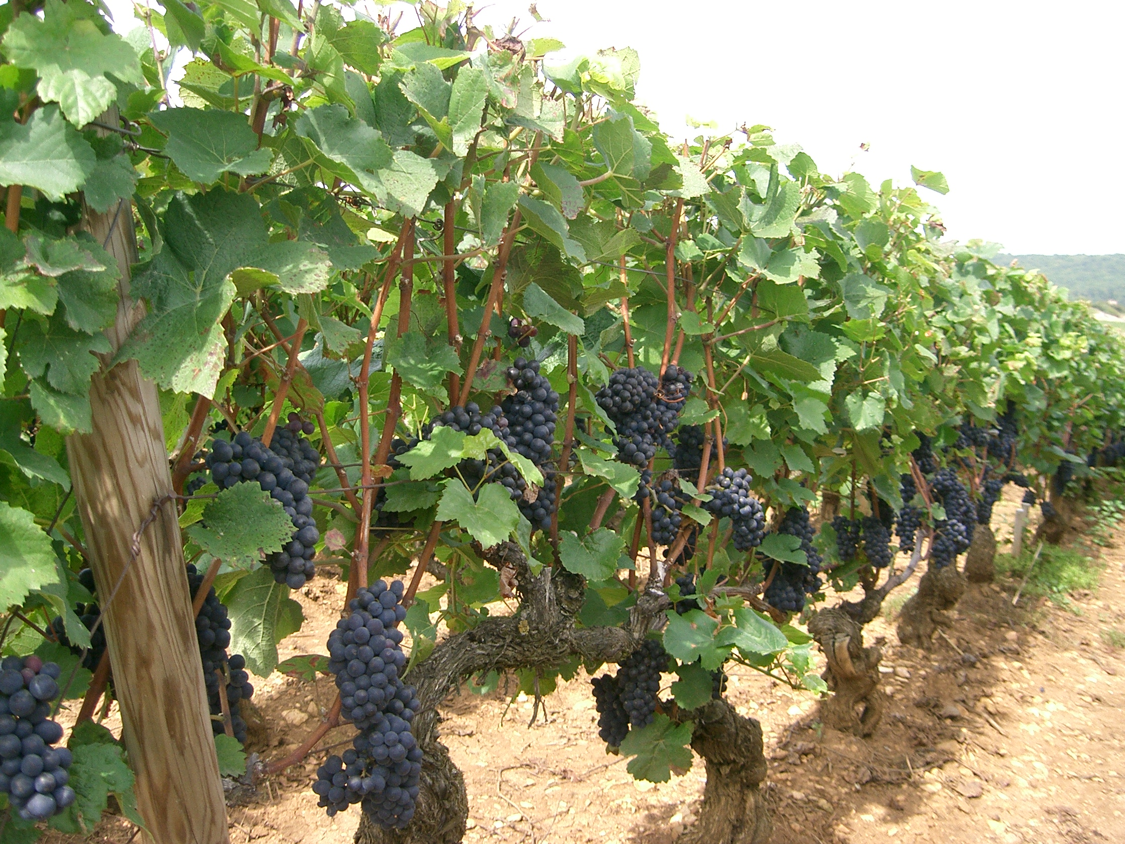 cépage Pinot noir en Bourgogne, à Santenay, à la période des vendanges